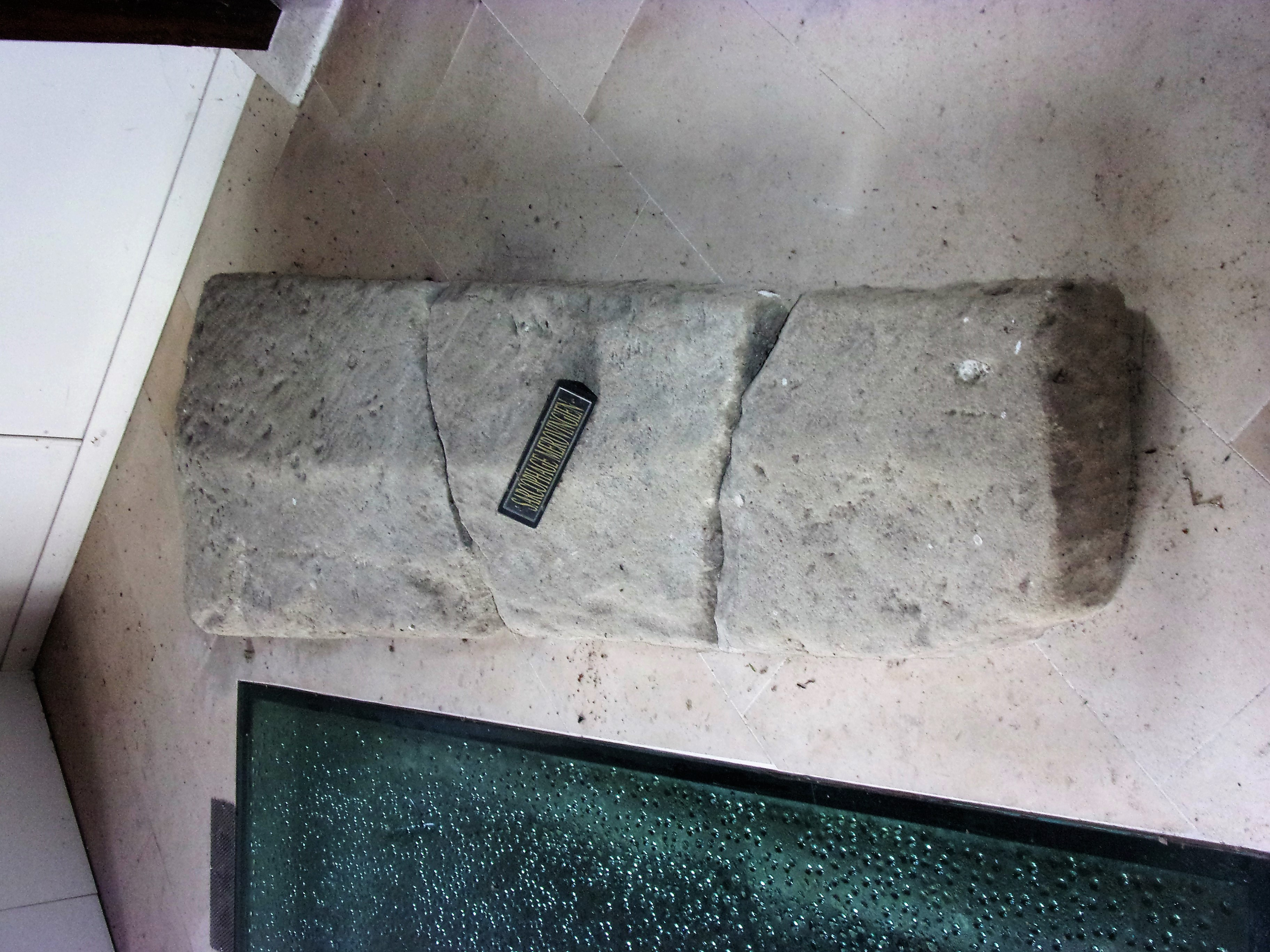 Sarcophage mérovingien. Musée Minerve d'Yzeures-sur-Creuse.